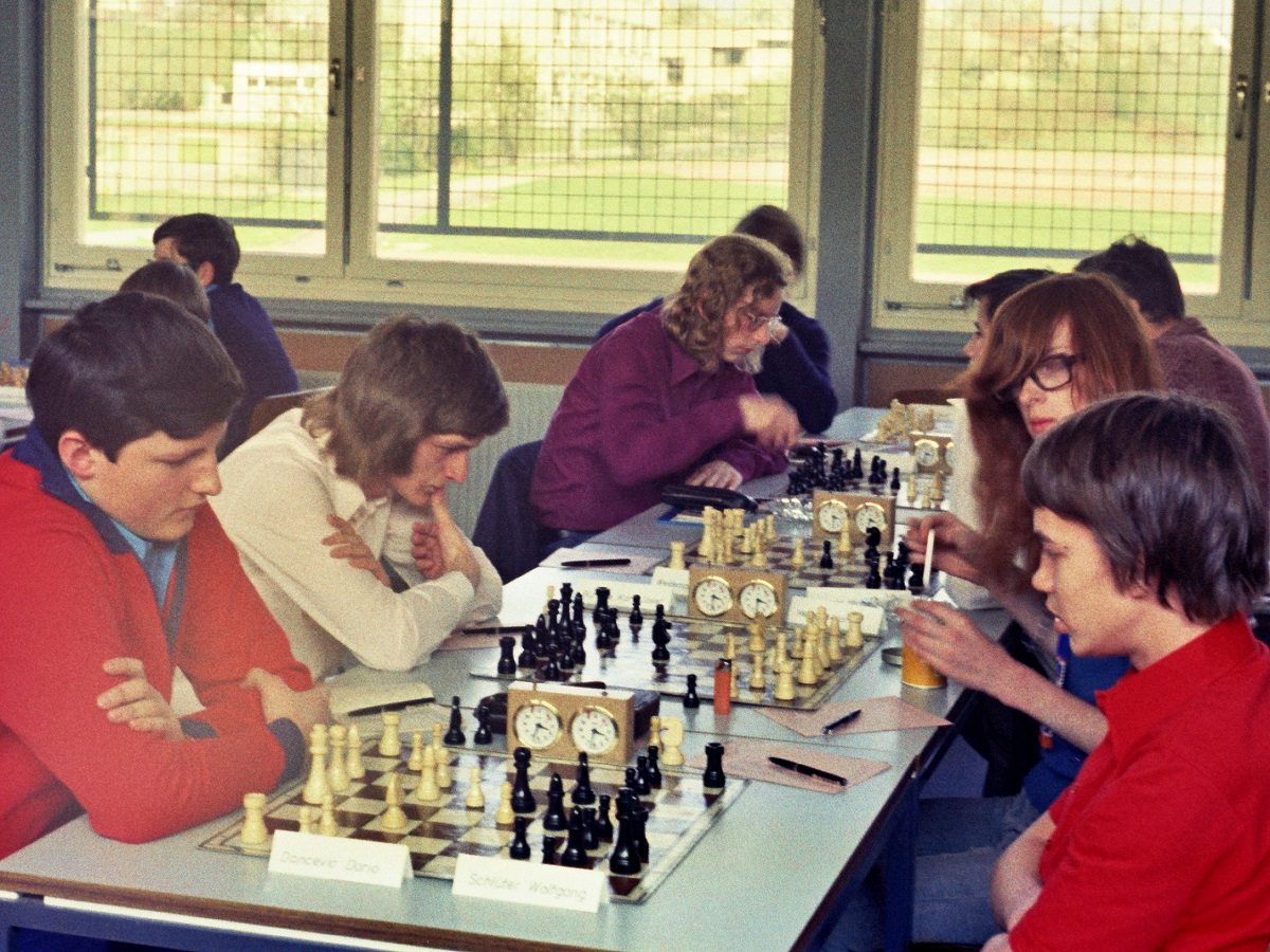 Zweite Runde der Jugendeinzelmeisterschaft 1974 des Schachverbandes Mittelrhein, Bergisch Neukirchen am 7. April 1974. Paarungen an den 5 Brettern (von vorn nach hinten): Dario Doncevic - Wolfgang Schlüter, Karl-Josef Bürckle und Allart Meyer, Franz-Josef Knauf - Arne Deppe, Ullrich Goebel und Claus Daehr, Jörg Weidemann - Michael Negele.